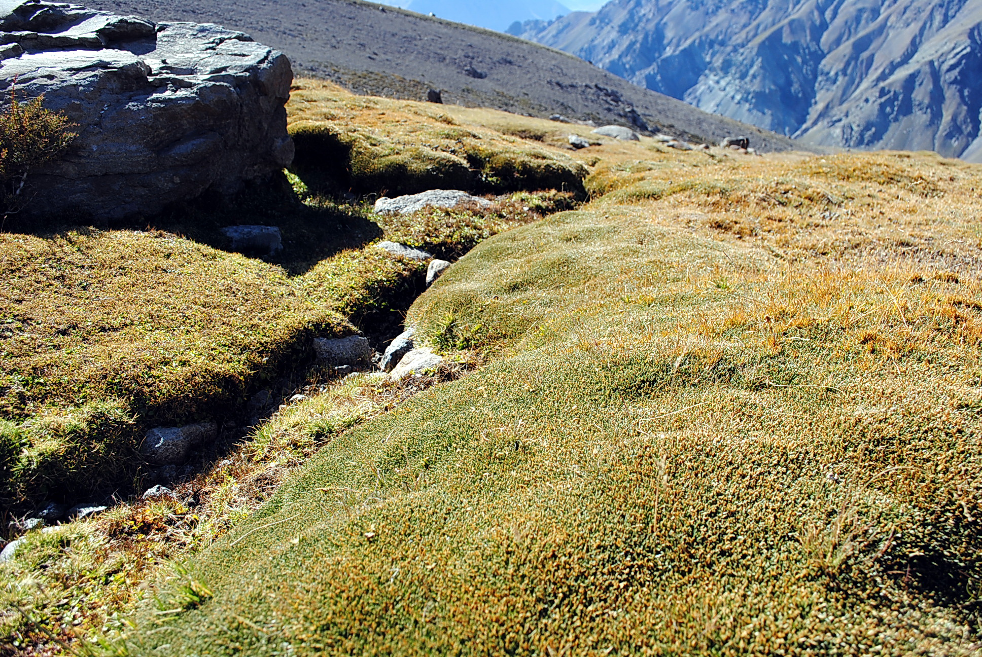 Patosia clandestina 92